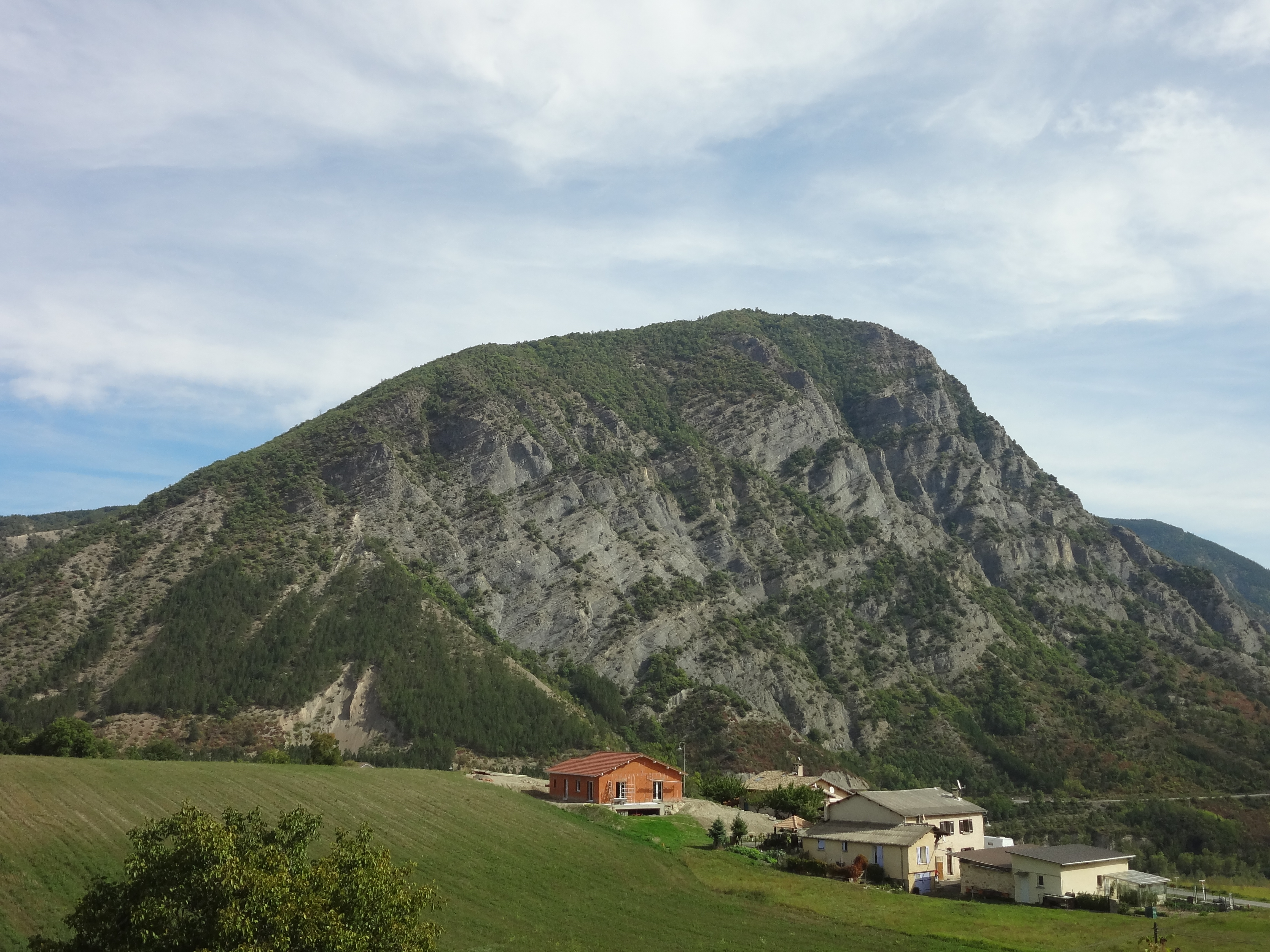 1410 m